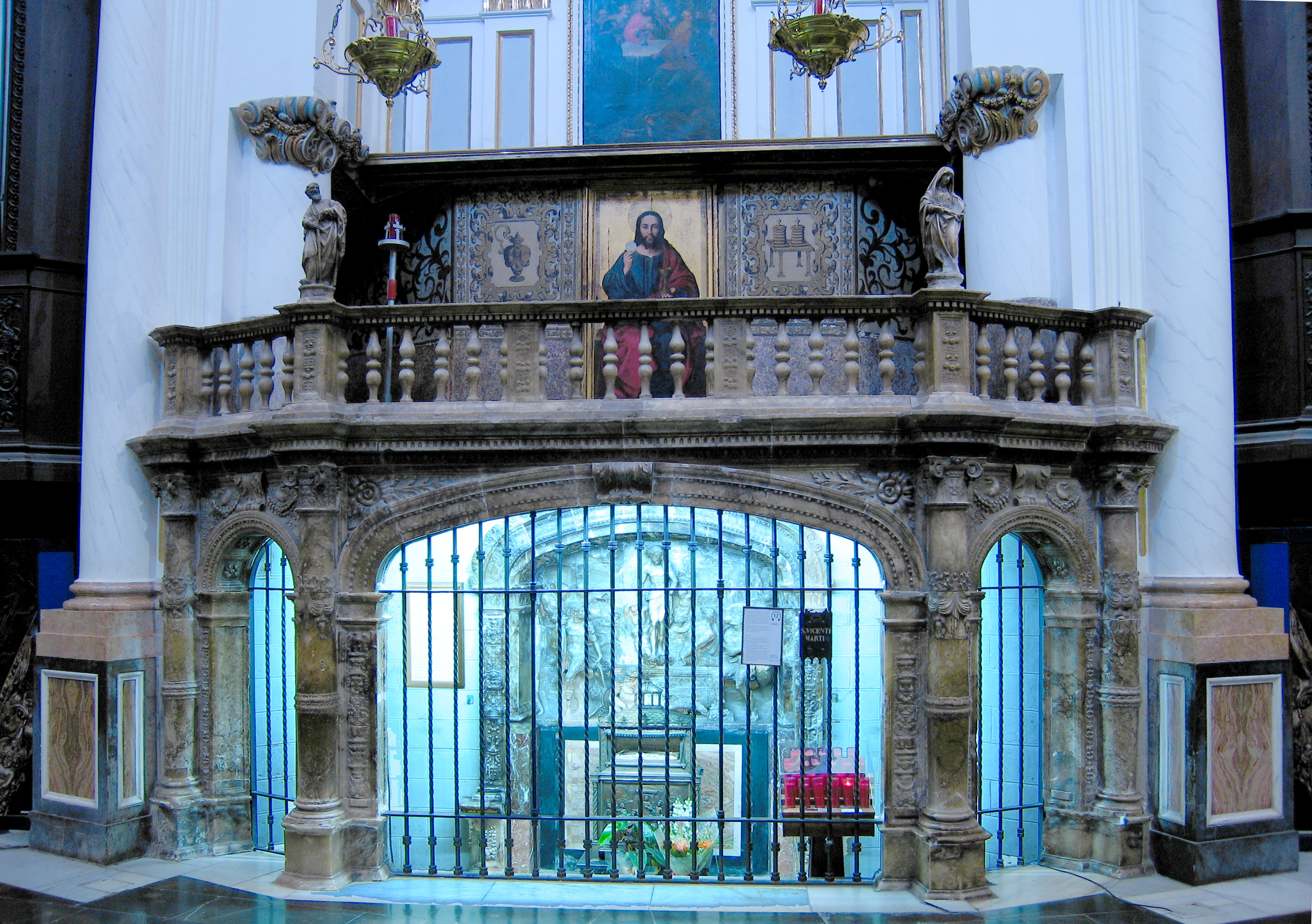 Girola Seu de València